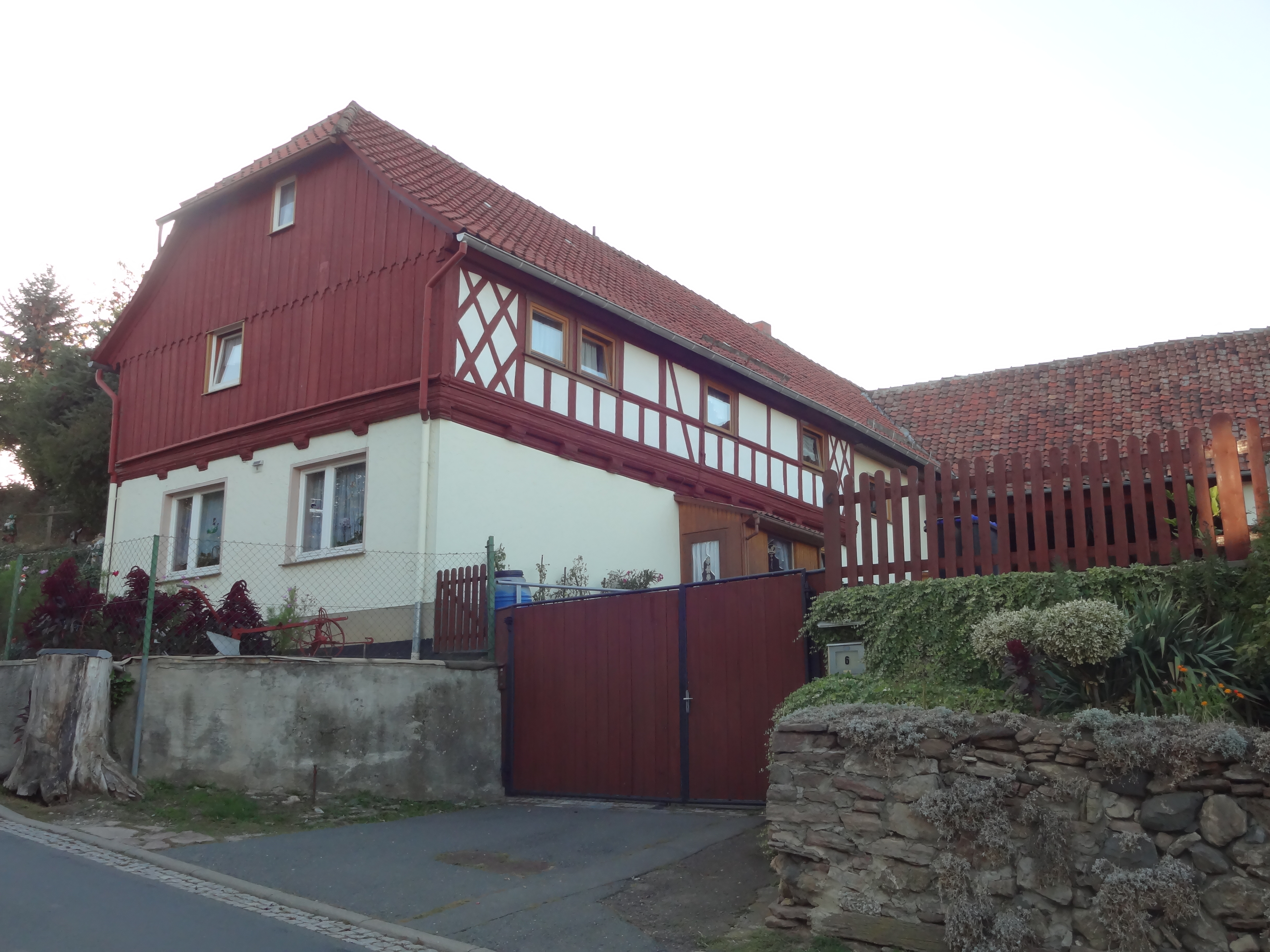 denkmalgeschütztes Wohnhaus in der Elbingeröder Straße 6 in Heimburg